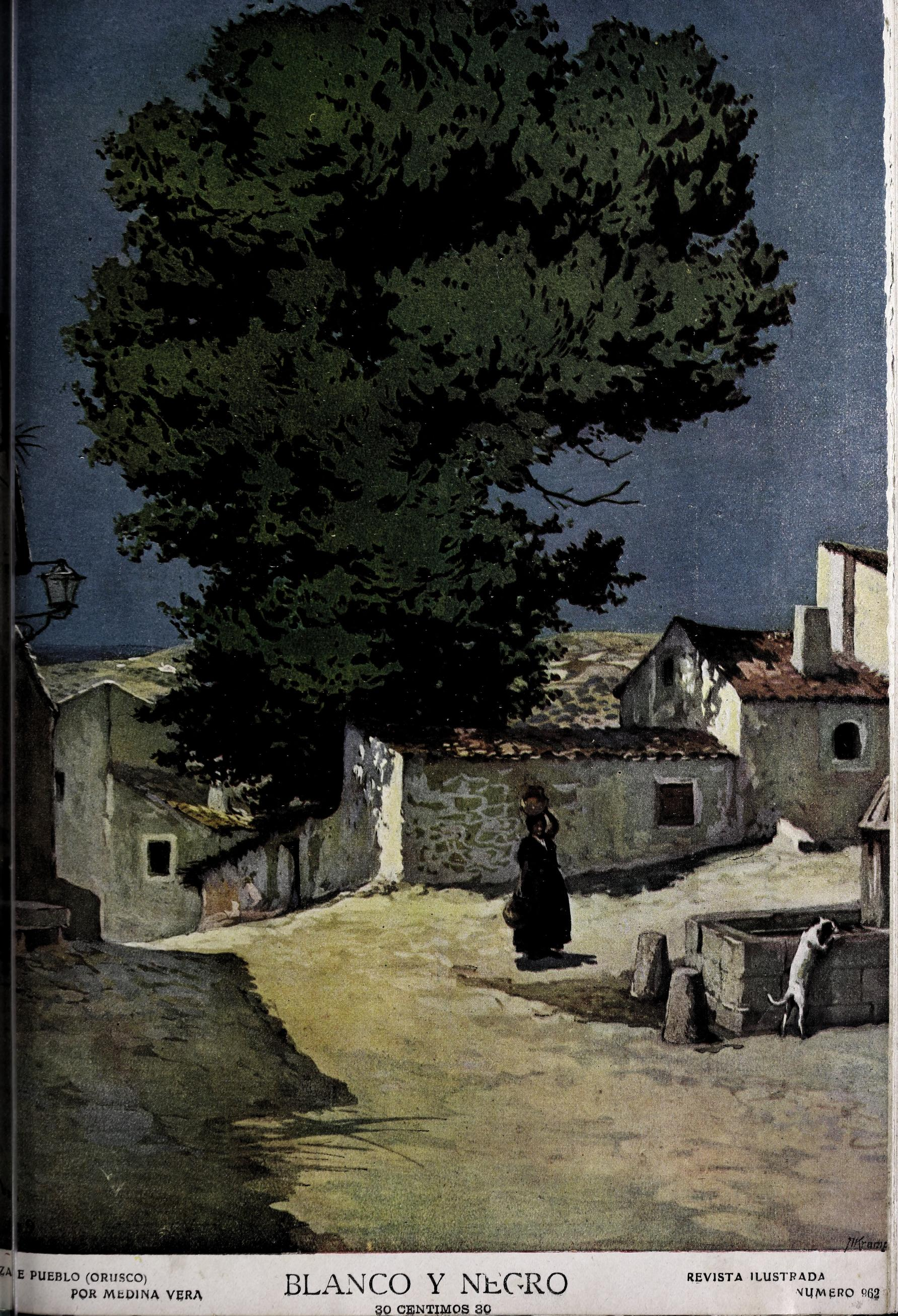 Orusco.